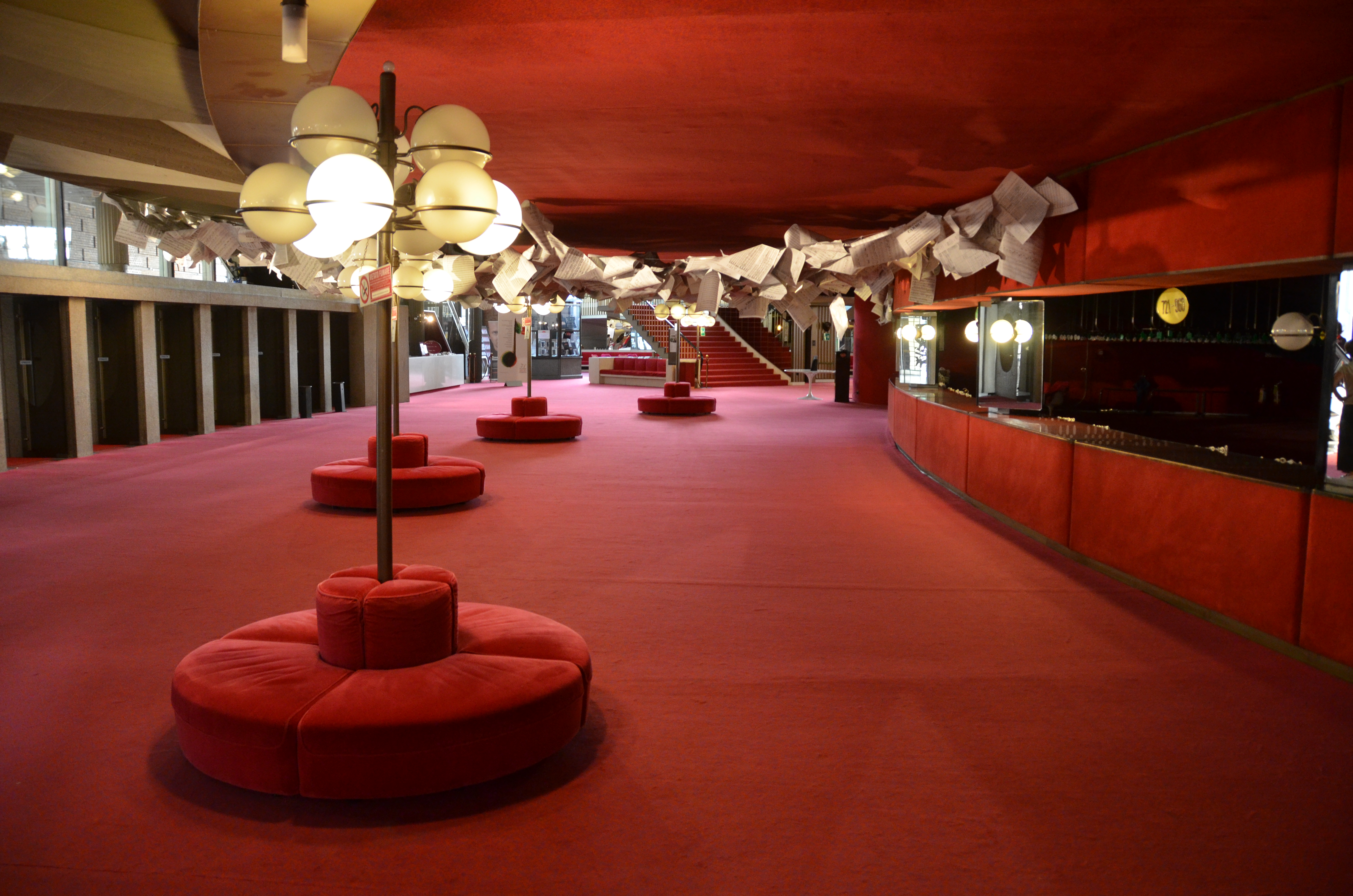 Teatro Regio de Torí - Hall